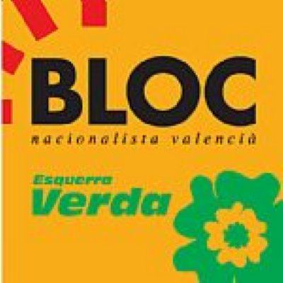 Combinació d'imatges planes, bàsiques i genèriques que intenten representar el logo de la Coalició BLOC-Esquerra Verda (2003-2004)